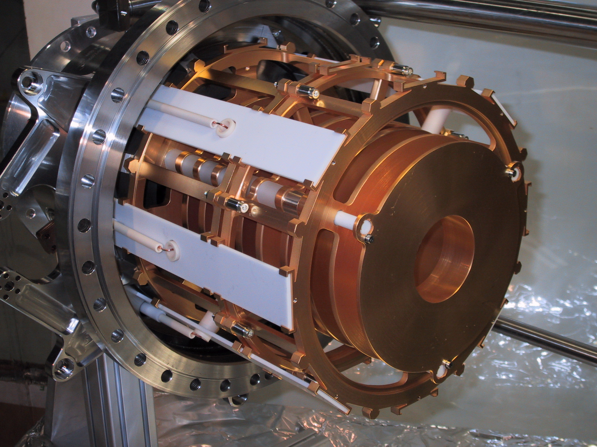 Elektrostatischer Spiegel der CTF-Ionenfalle